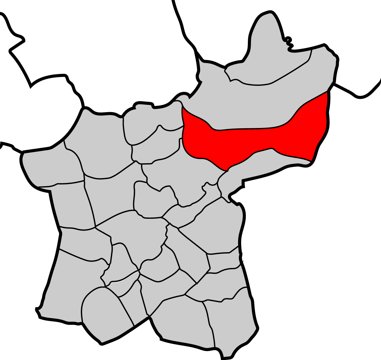 Mapa parroquia de San Martín de Neira de Rei Baralla